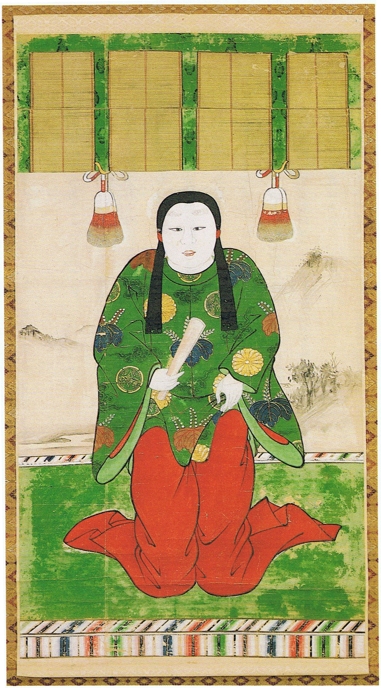 『安徳天皇御尊影』 赤間神宮所蔵